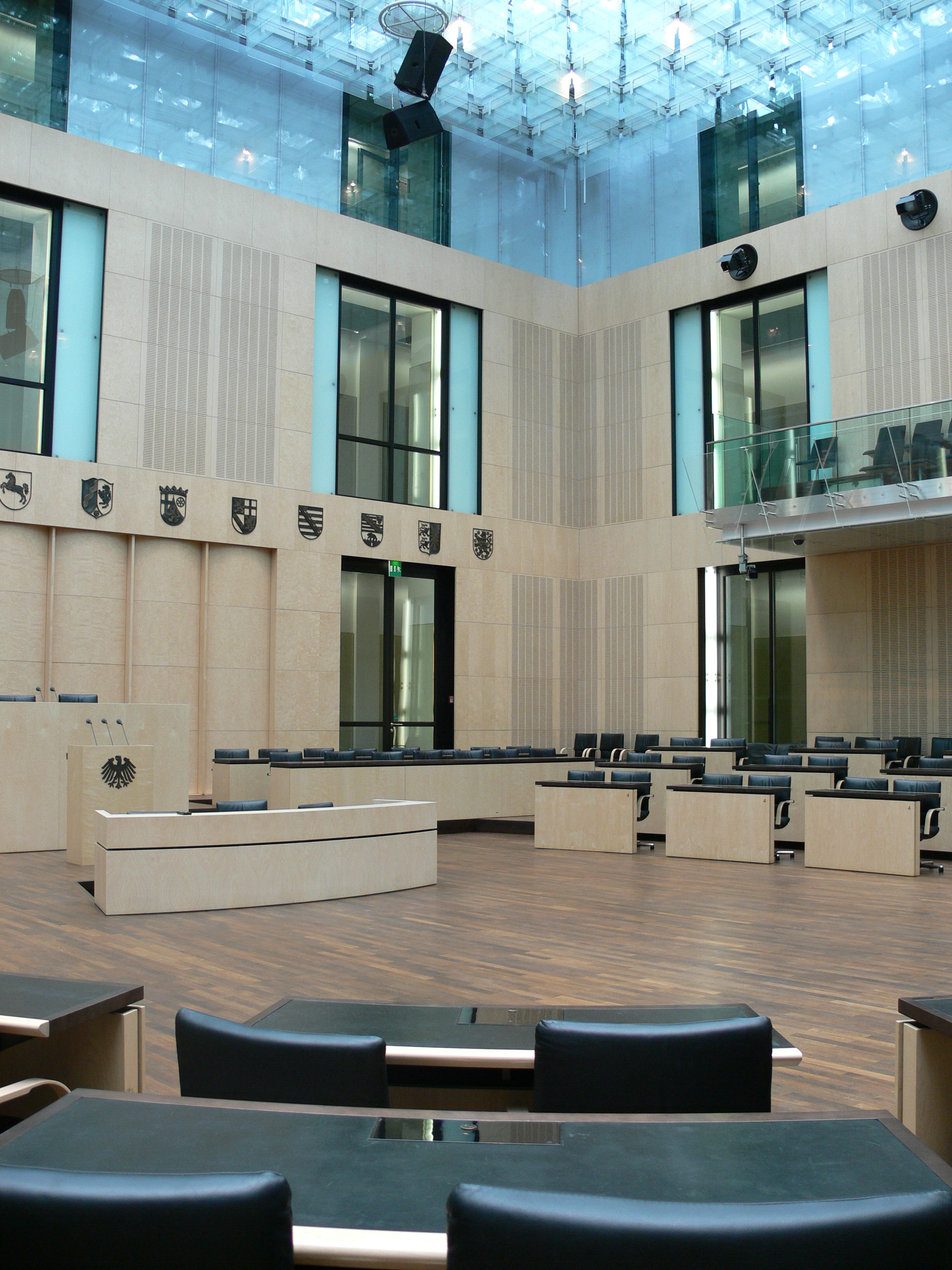 Plenarsaal des Deutschen Bundesrats Ehemaliges Preußisches Herrenhaus; Sitz des Bundesrats der Bundesrepublik Deutschland; Leipziger Straße, Berlin